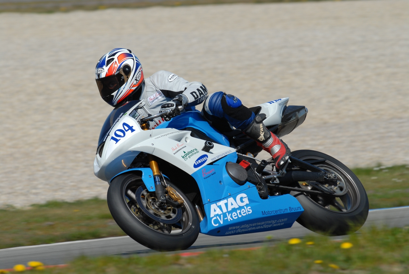 Kevin Bruurs op een Triumph Daytona 675 op het tt-circuit van assen